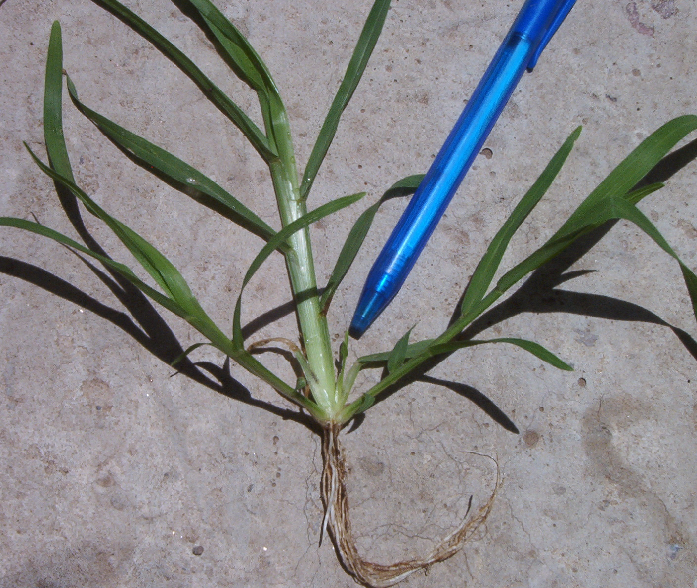 Poaceae, las gramíneas. Este pasto de varios días de vida muestra dos macollos (tiller) creciendo a los lados del eje principal, y uno nuevo que se está desarrollando a partir de una yema en la axila de una hoja del eje principal, señalado con birome.